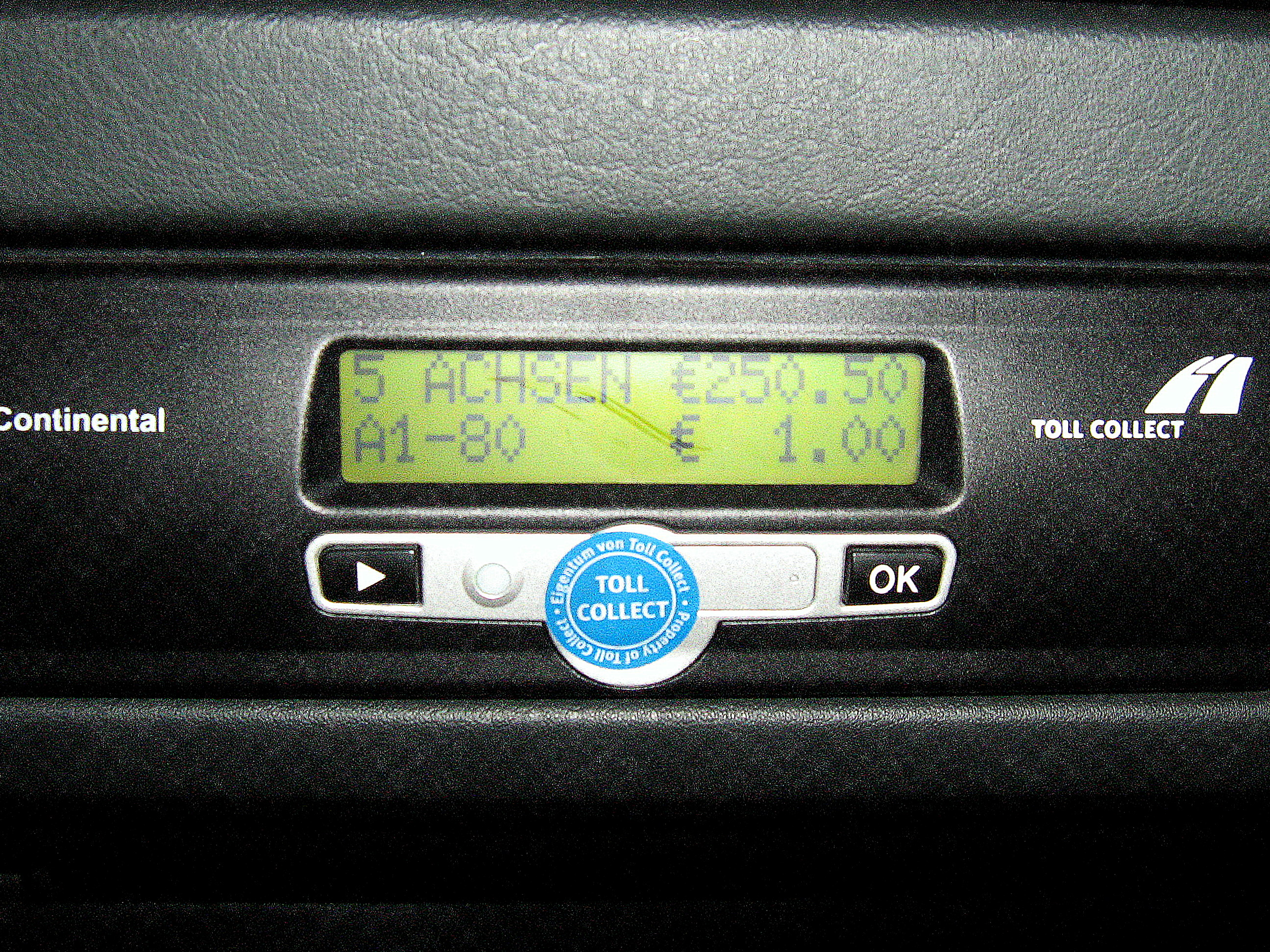 Toll-Collect Mautgerät im Betrieb